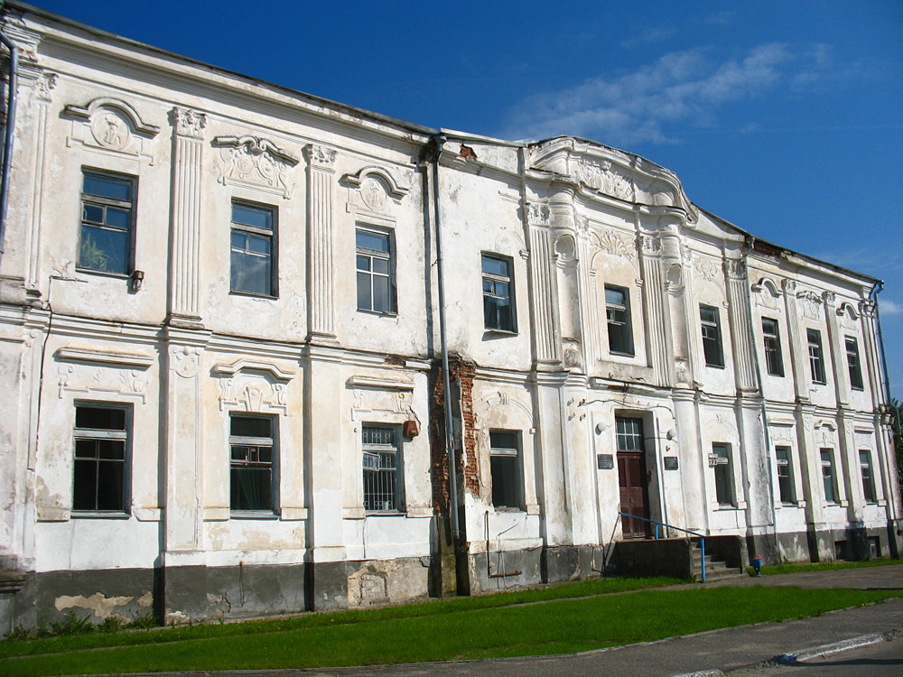 Беларуская (тарашкевіца): Палац Радзівілаў у Зьдзецеле (Дзятлаве)